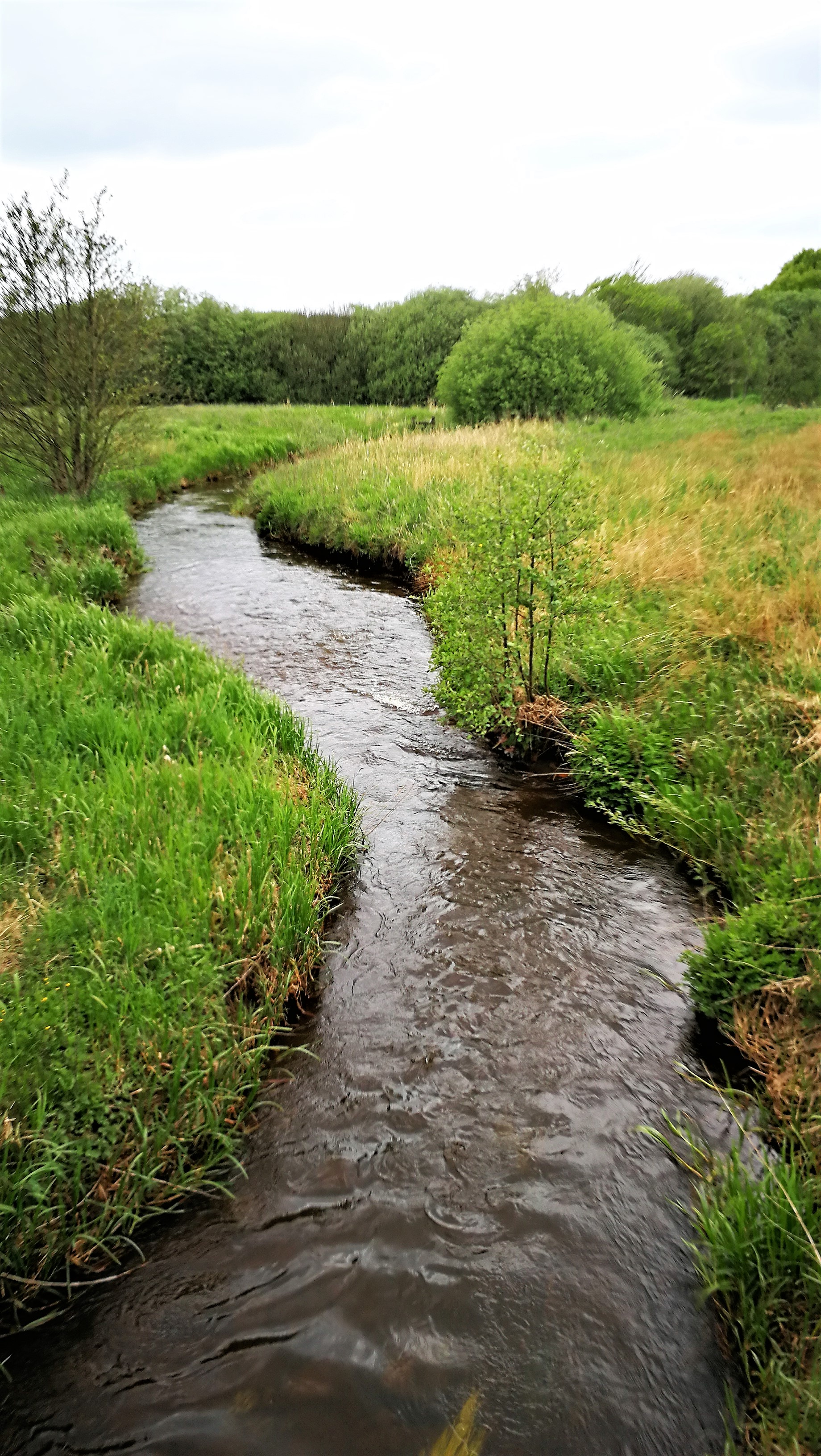 Karup Å vest for Skygge Bro, korte efter sammenløbet af Skygge- og Bording Å